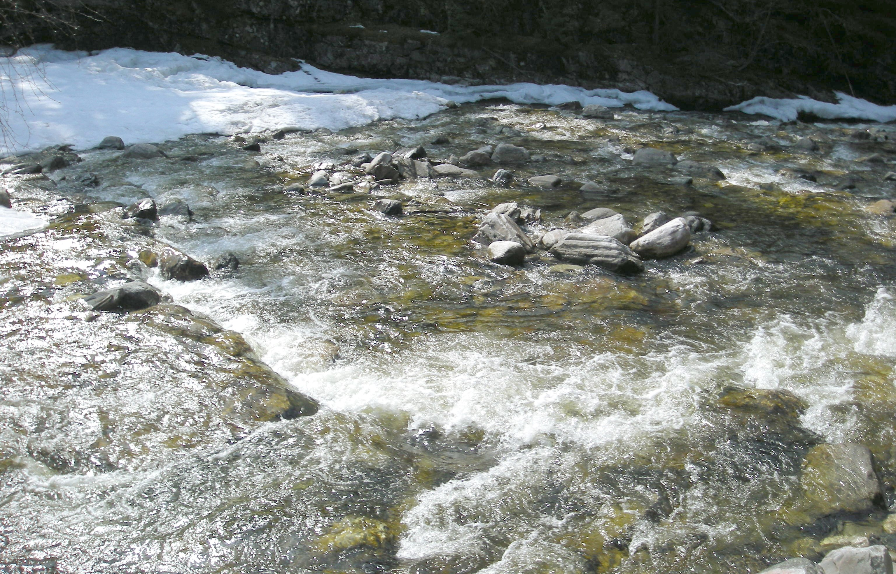 Ula i Sel kommune i Oppland